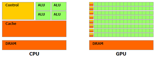 GPU daugiau tranzistorių skirta duomenų apdorojimui